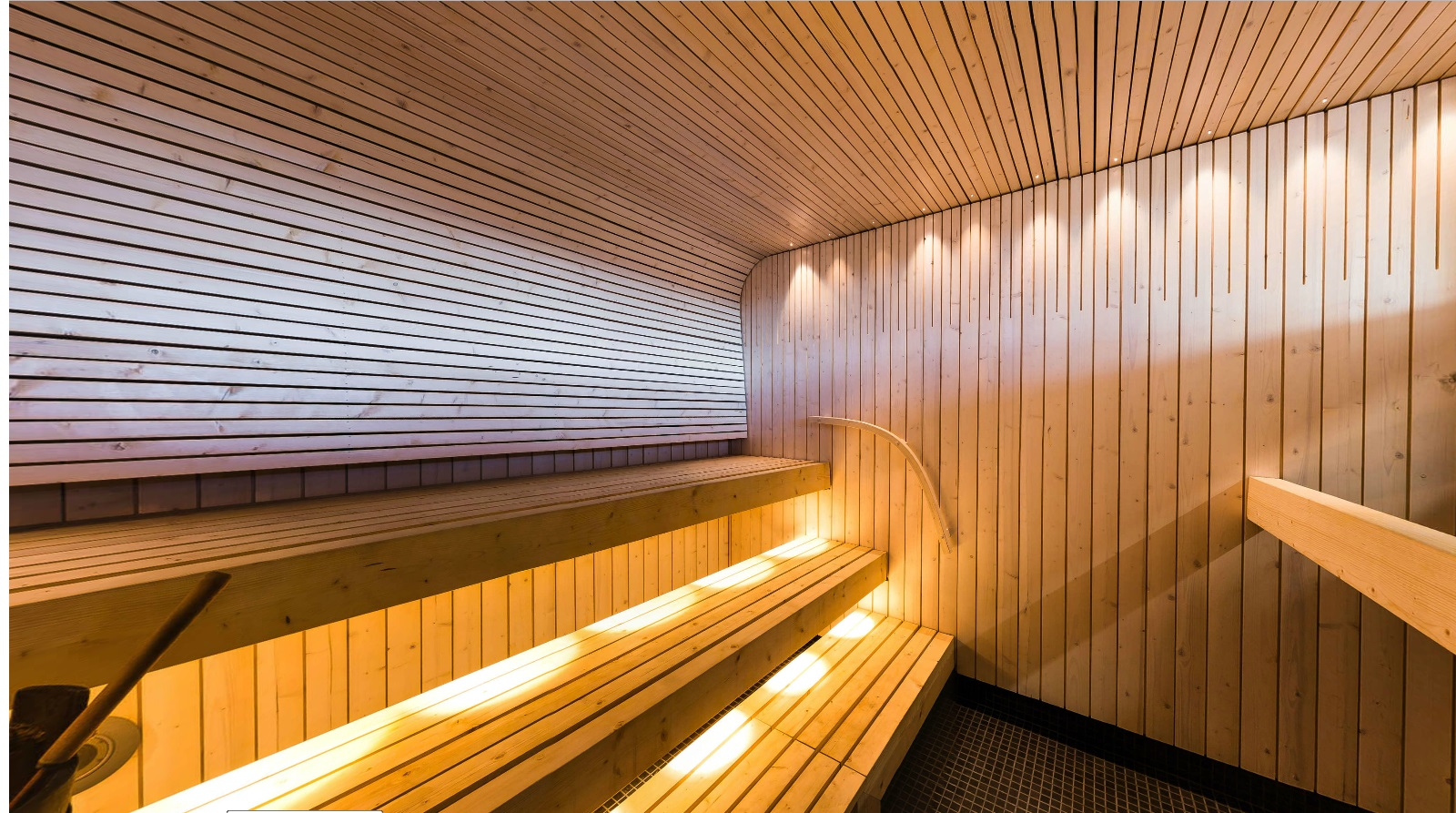 Sauna Kuusirima